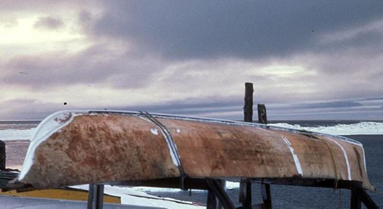 Un umiak, embarcation avec une armature en bois et une coque en peau de bête.